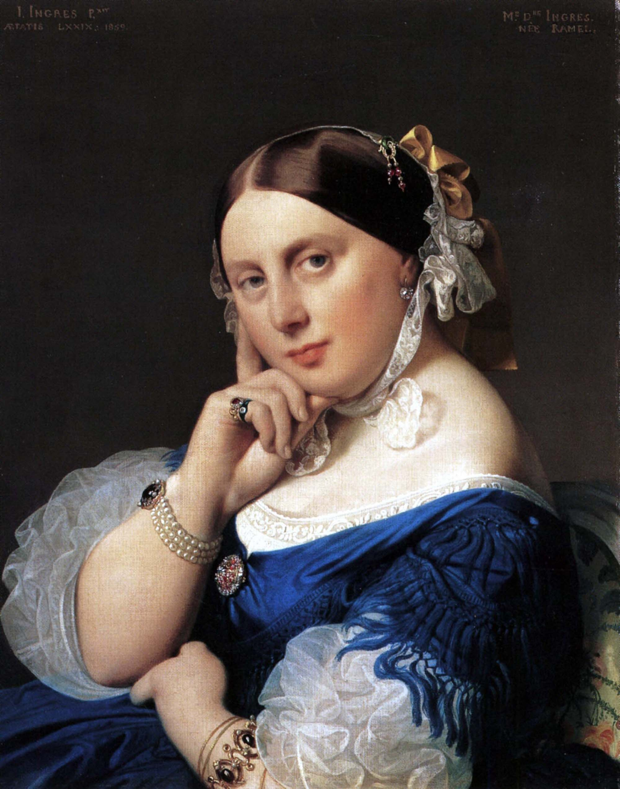 Ingres, portrait de madame Ingres née Ramel 1859